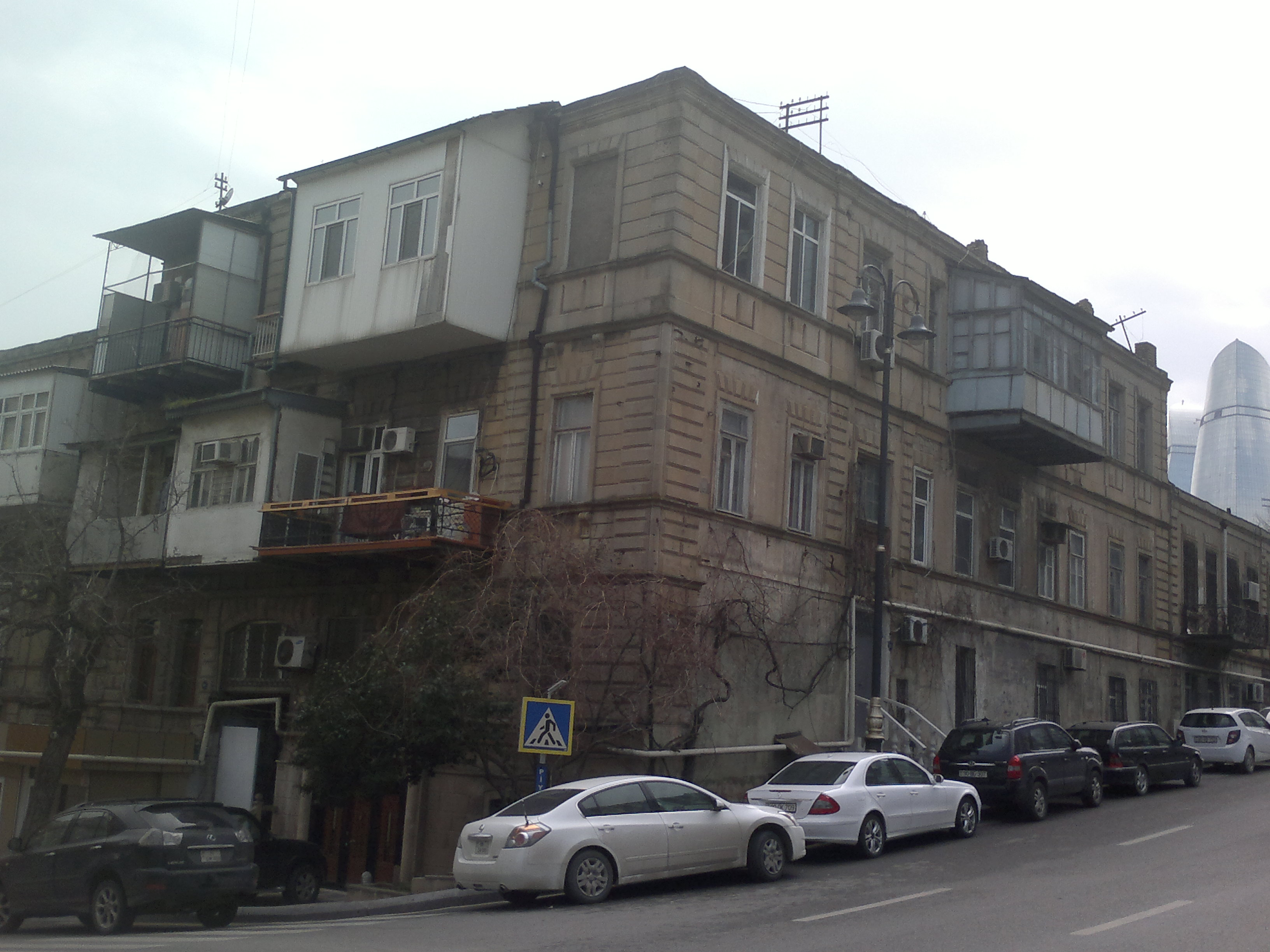 Building on Sheikh Shamil Street 25. Built in 1911.